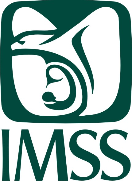 Logotipo del Instituto Mexicano del Seguro Social (IMSS)